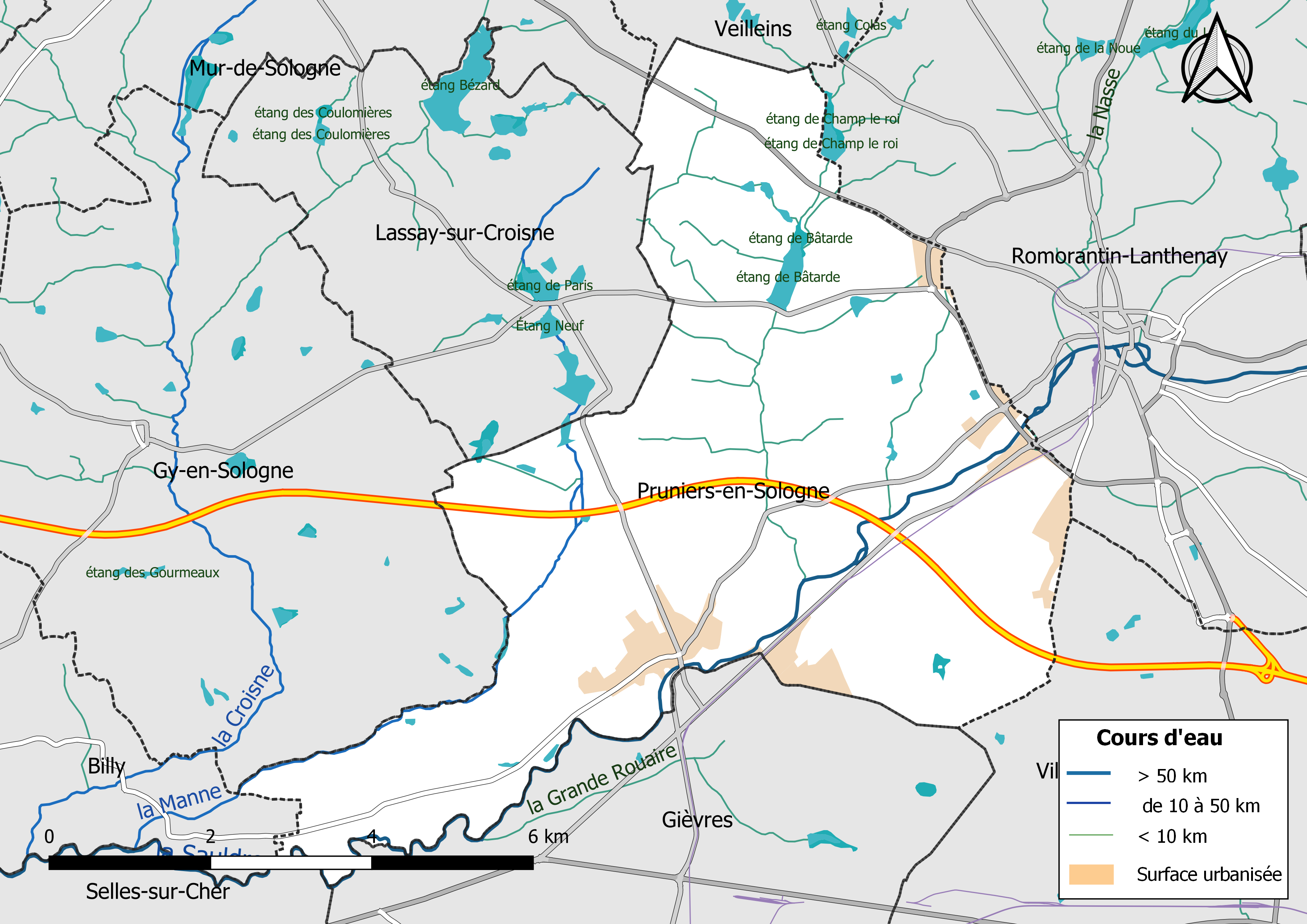 Carte du réseau hydrographique de la commune de Pruniers-en-Sologne (Loir-et-Cher, France).